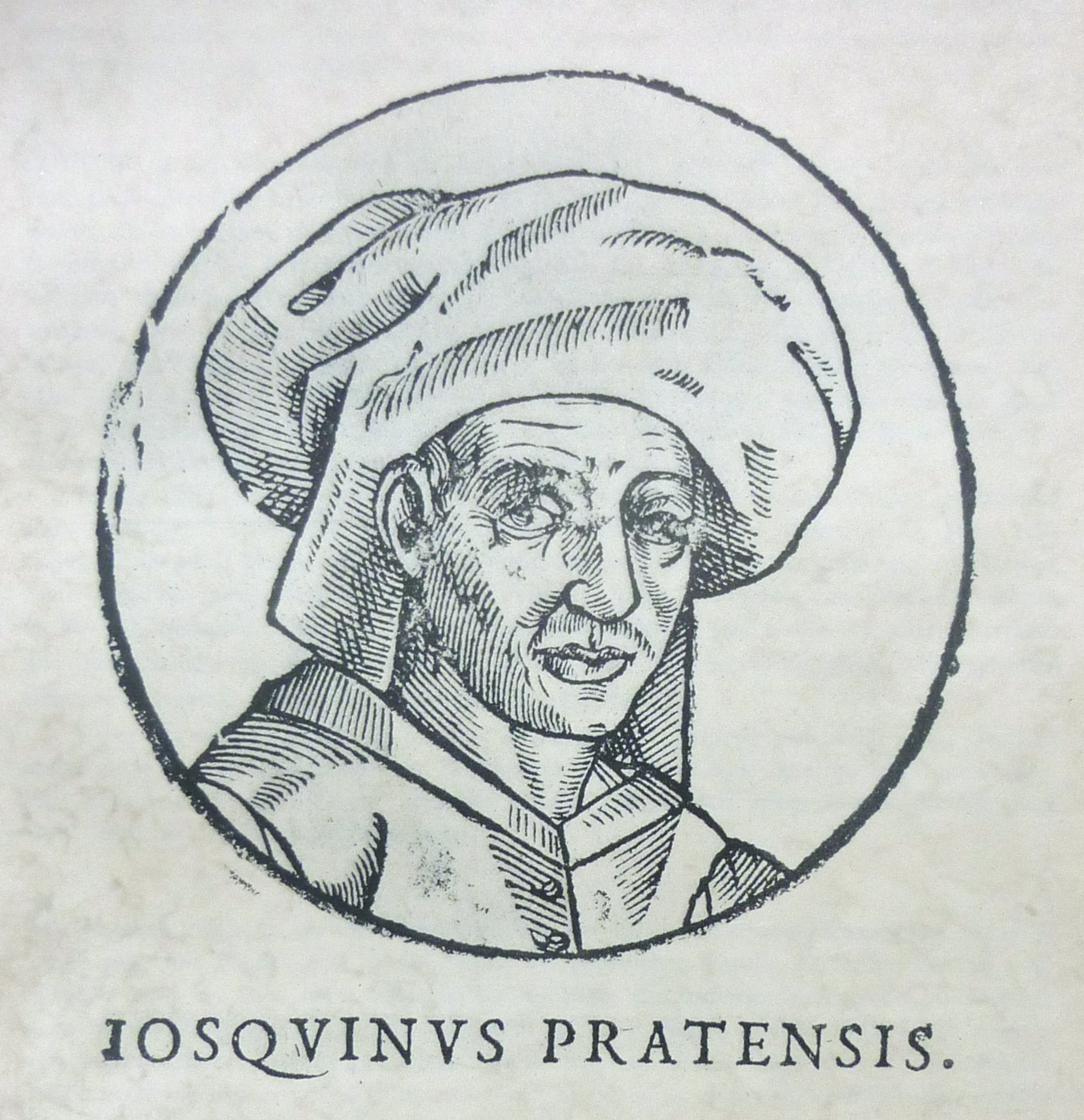 Josquin Desprez, Holzschnitt, nach einem Gemälde in St. Gudule, aus Petrus Opmeer's Opvs chronographicvm orbis vniversi a mvndi exordio vsqve ad annvm M.DC.XI. (Antwerp, 1611).